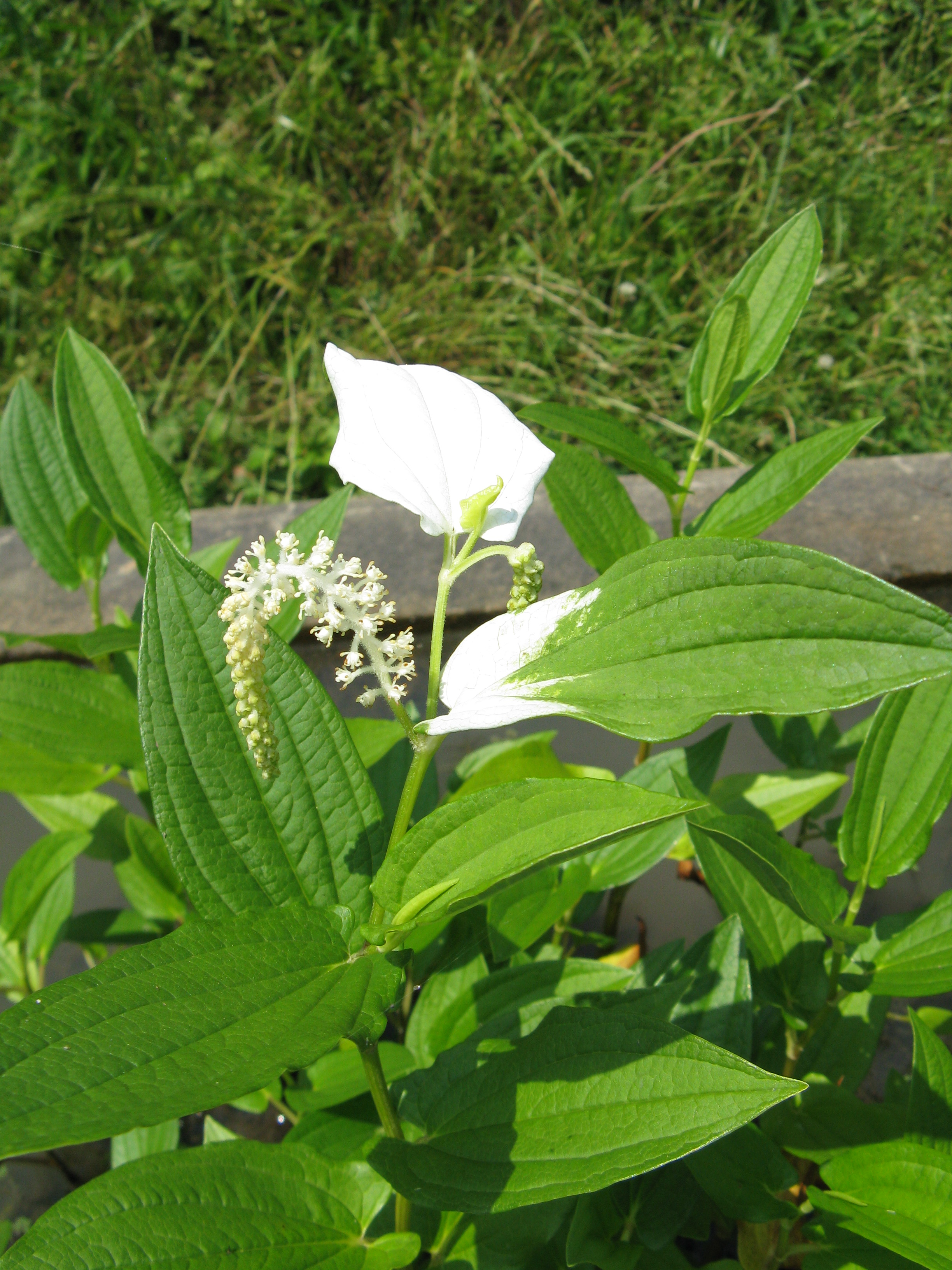 Scientific name Saururus chinensis